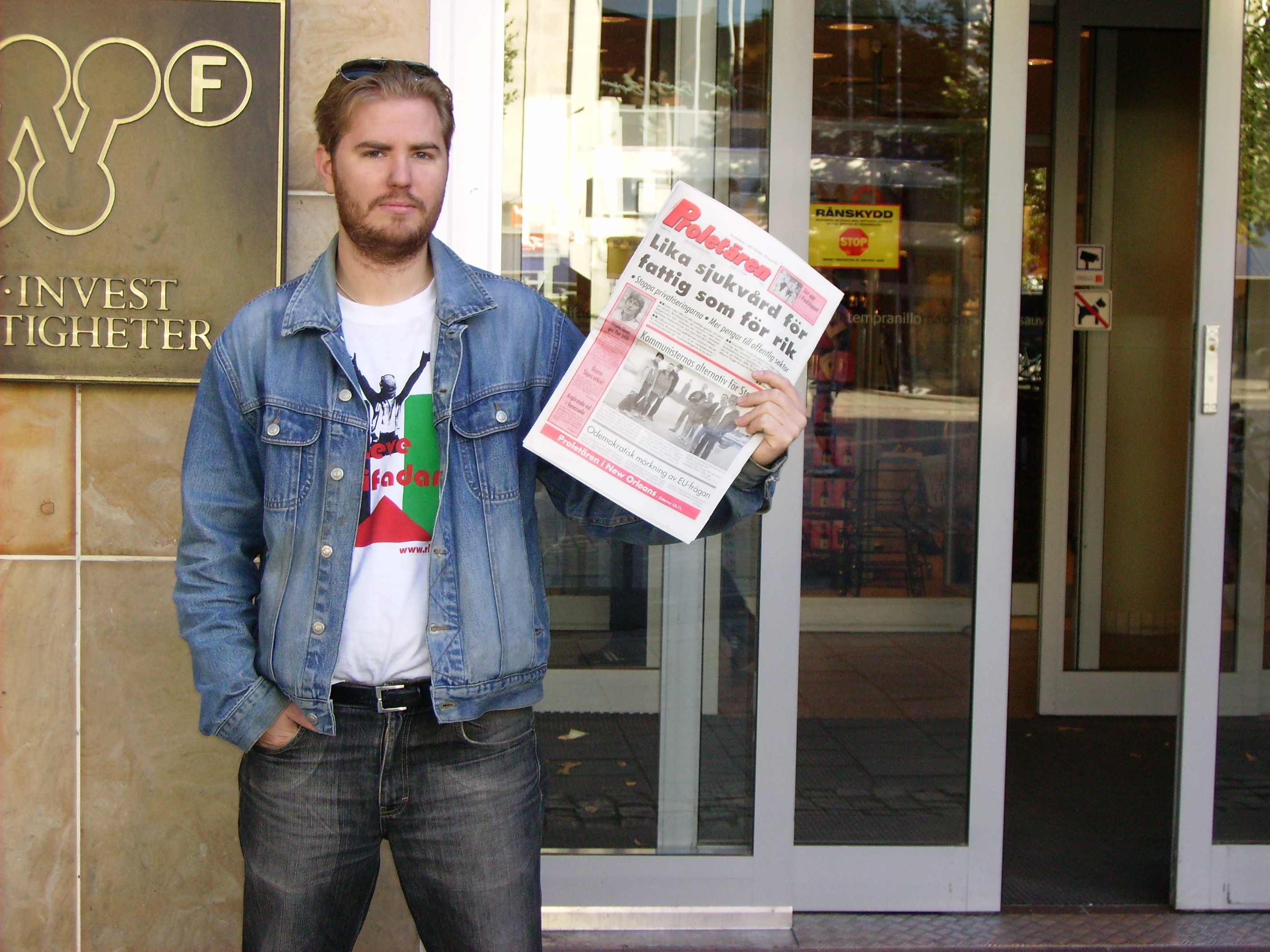 Proletärenförsäljare